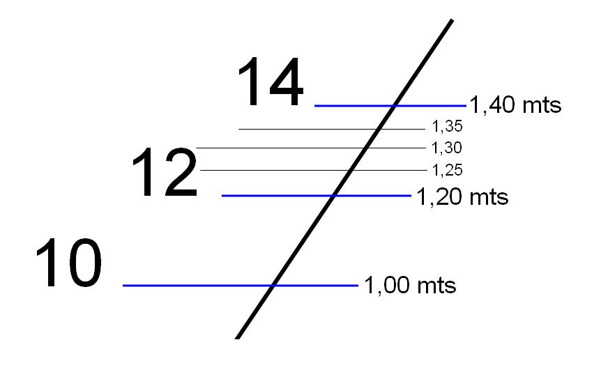 Draft metric scale